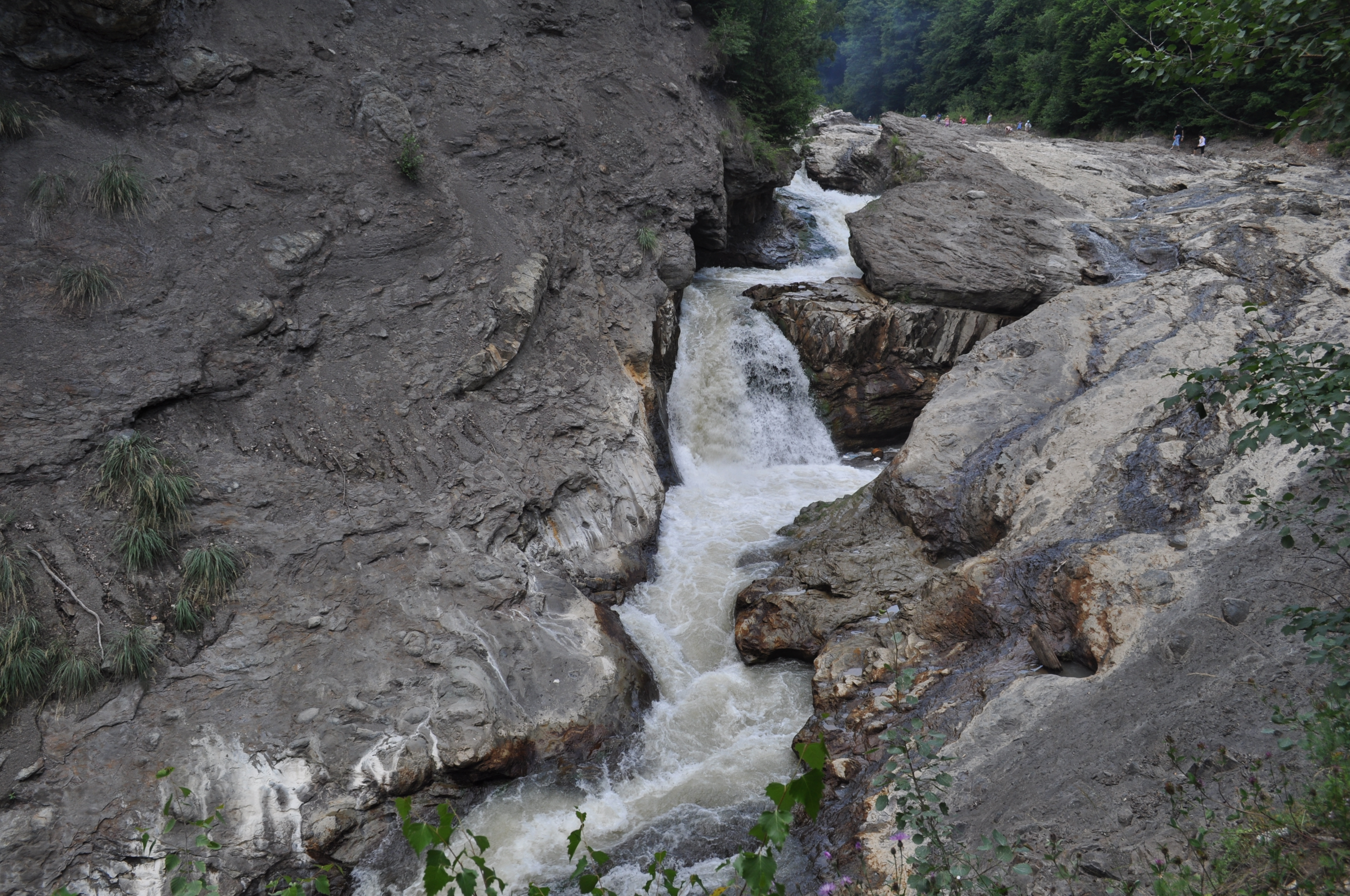 Cascada Putnei, județul Vrancea